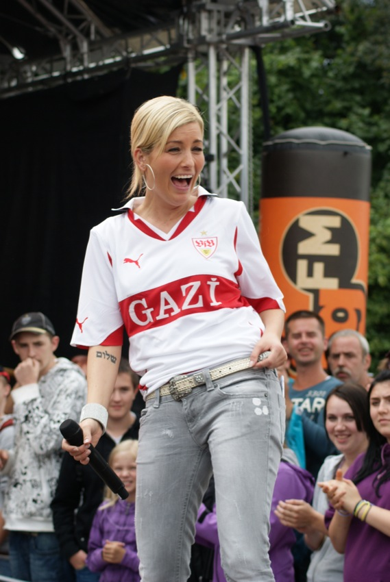 VfB Opening 2010